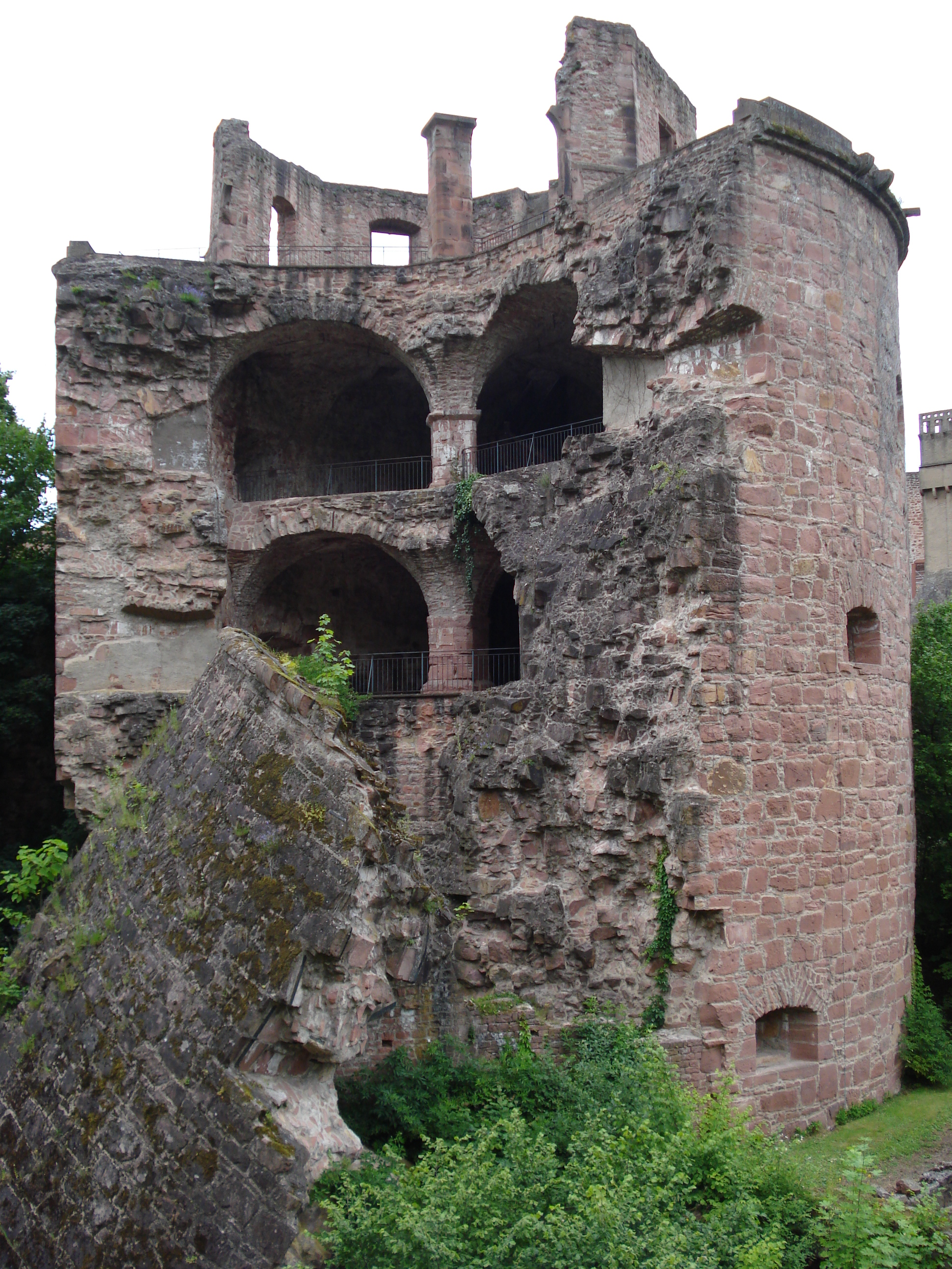 Tour rompue du château d'Heidelberg en Allemagne.